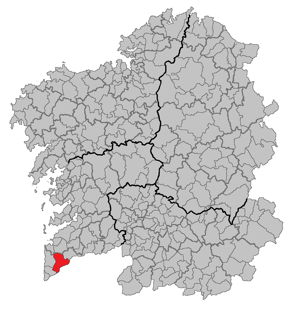 Mapa coa localización do concello de Tomiño.